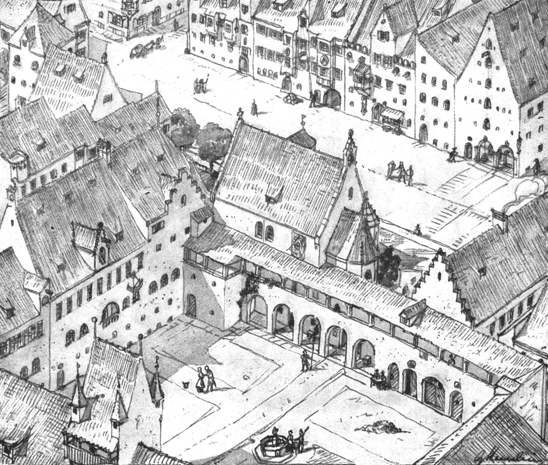 Abb. 38. Der alte Hof mit der Lorenzkirche.